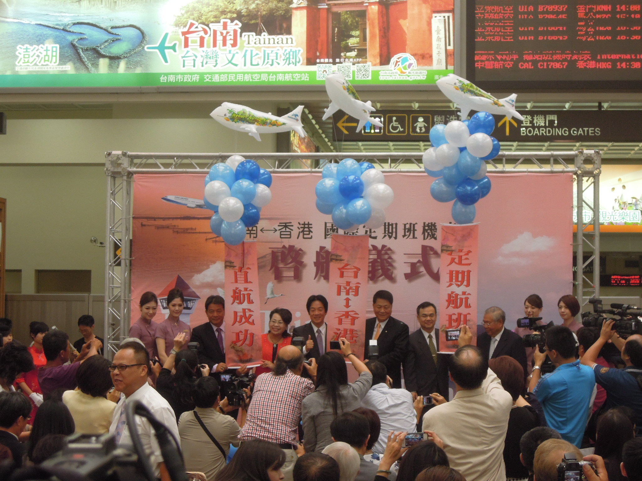 2013年7月18日臺南─香港線首航